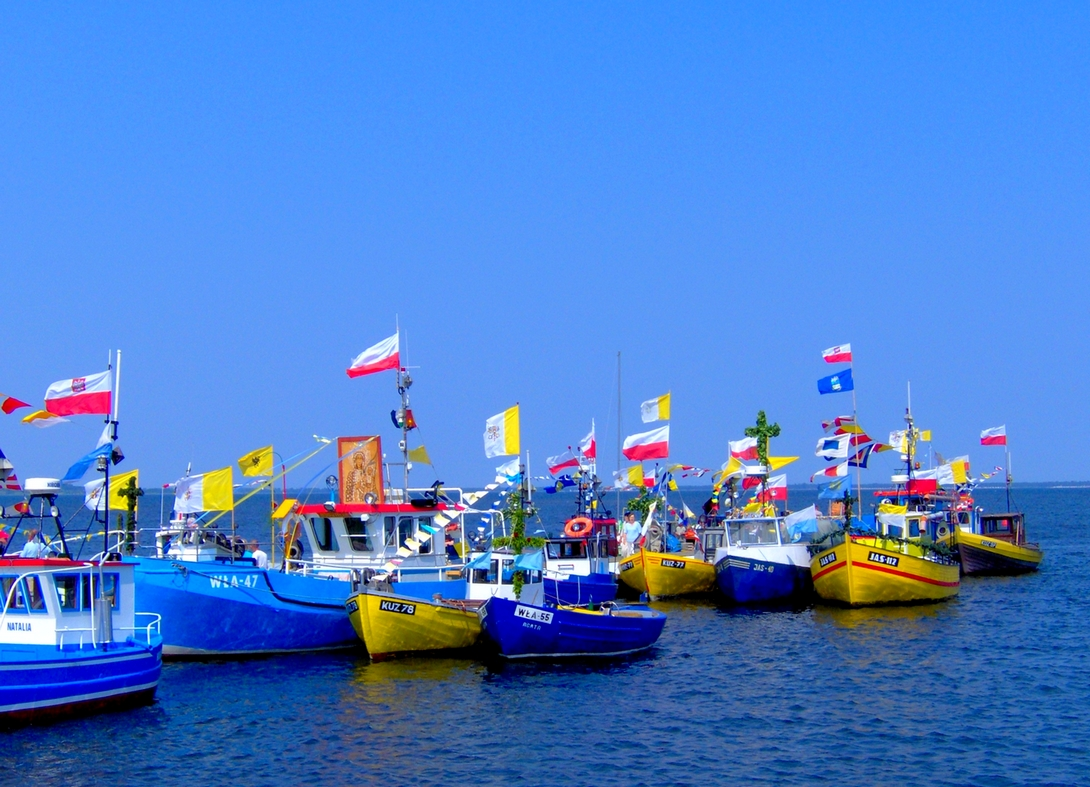 Kutry podczas pielgrzymki rybackiej do Pucka - 25.06.2006 Pilgrimage of fishermen to Puck for a church fair, Poland, Bay of Puck, Baltic Sea, 25.06.2006 Autor: Krzysztof